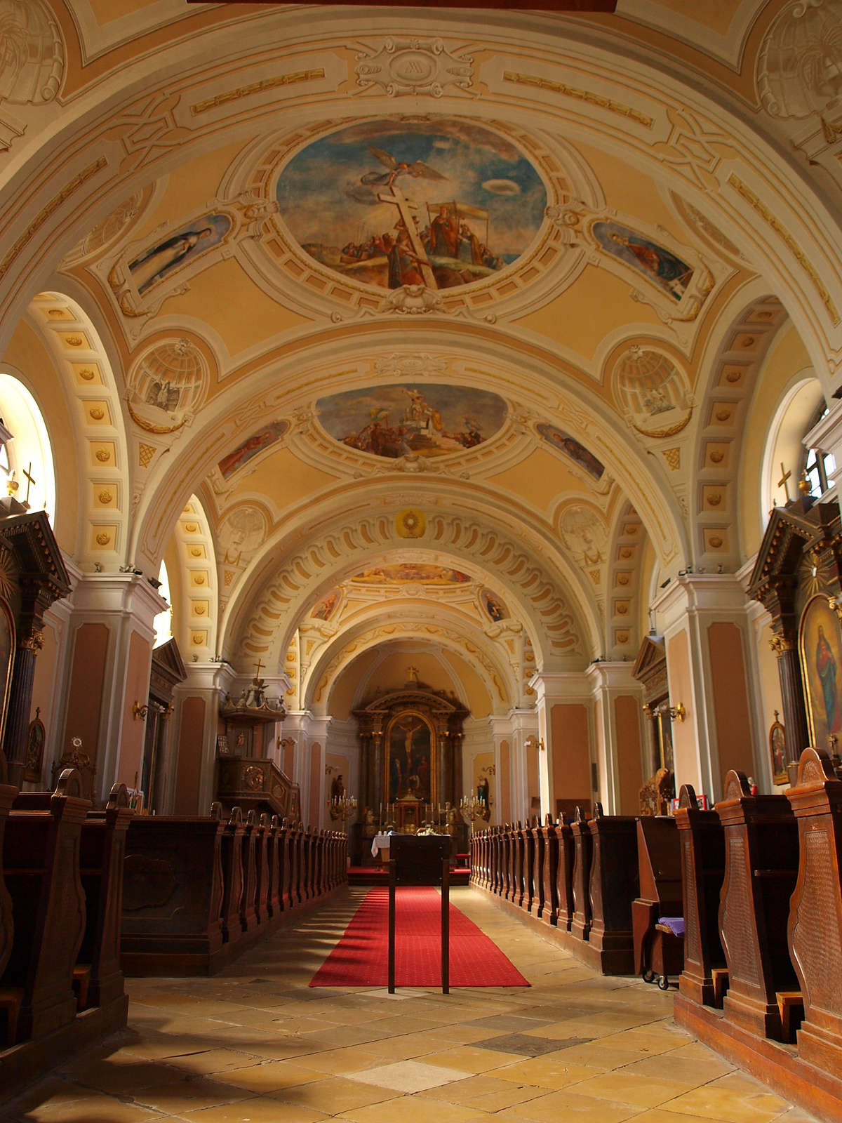 Római katolikus plébániatemplom (Cegléd, Kossuth Lajos tér) This is a photo of a monument in Hungary, Identifier: 6941